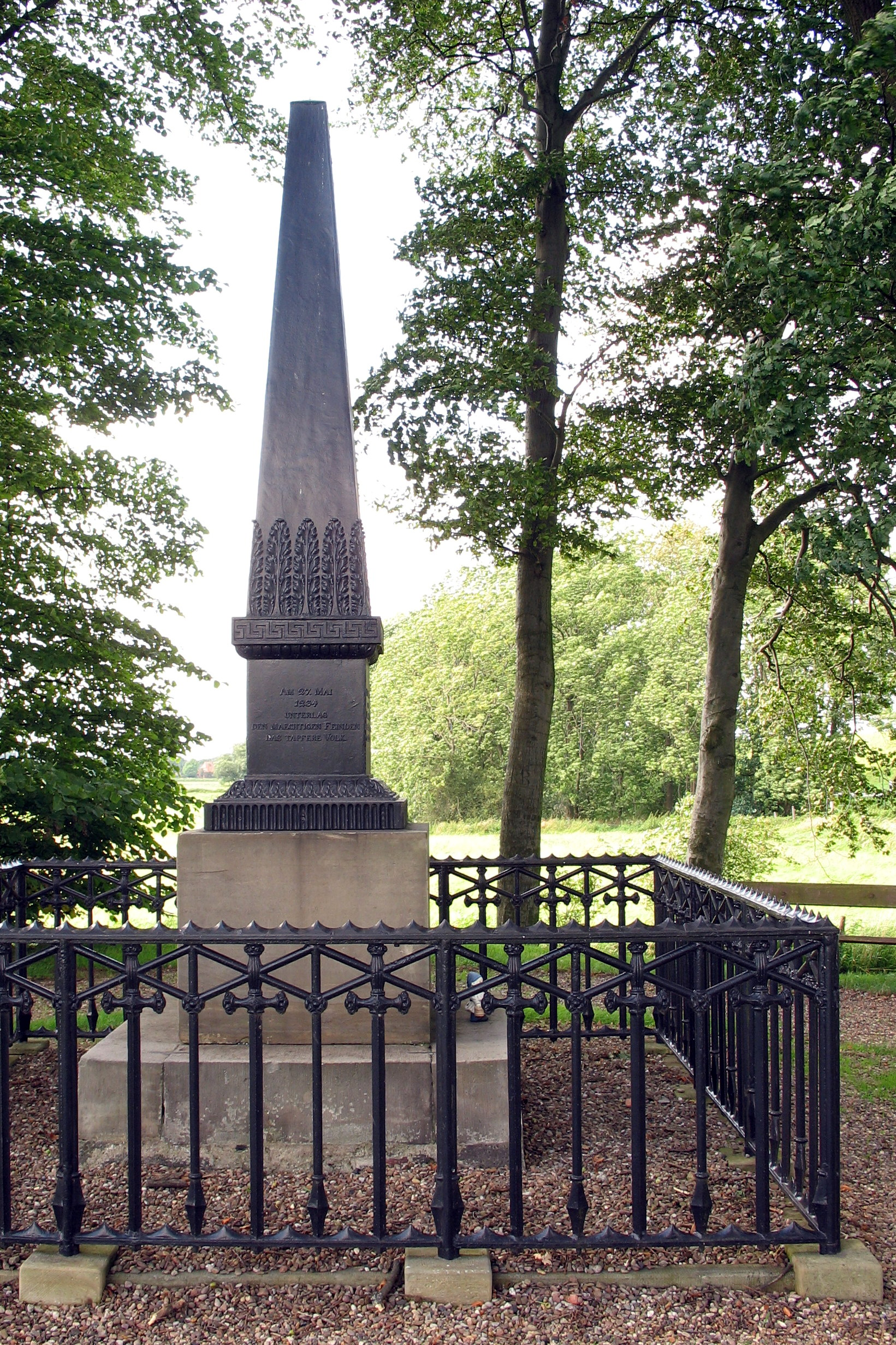 Das gusseiserne Veits-Denkmal auf dem St.-Veit-Hügel in Altenesch bei Lemwerder, eingeweiht am 27. Mai 1834. Siehe Stedingsehre.